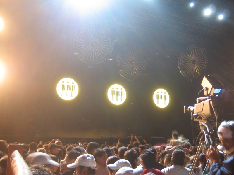 "Eran las 00H28 del domingo". Soda Stereo en Guayaquil, Ecuador. Público esperando. Gira: Me Verás Volver. ¿Los veremos volver otra vez?